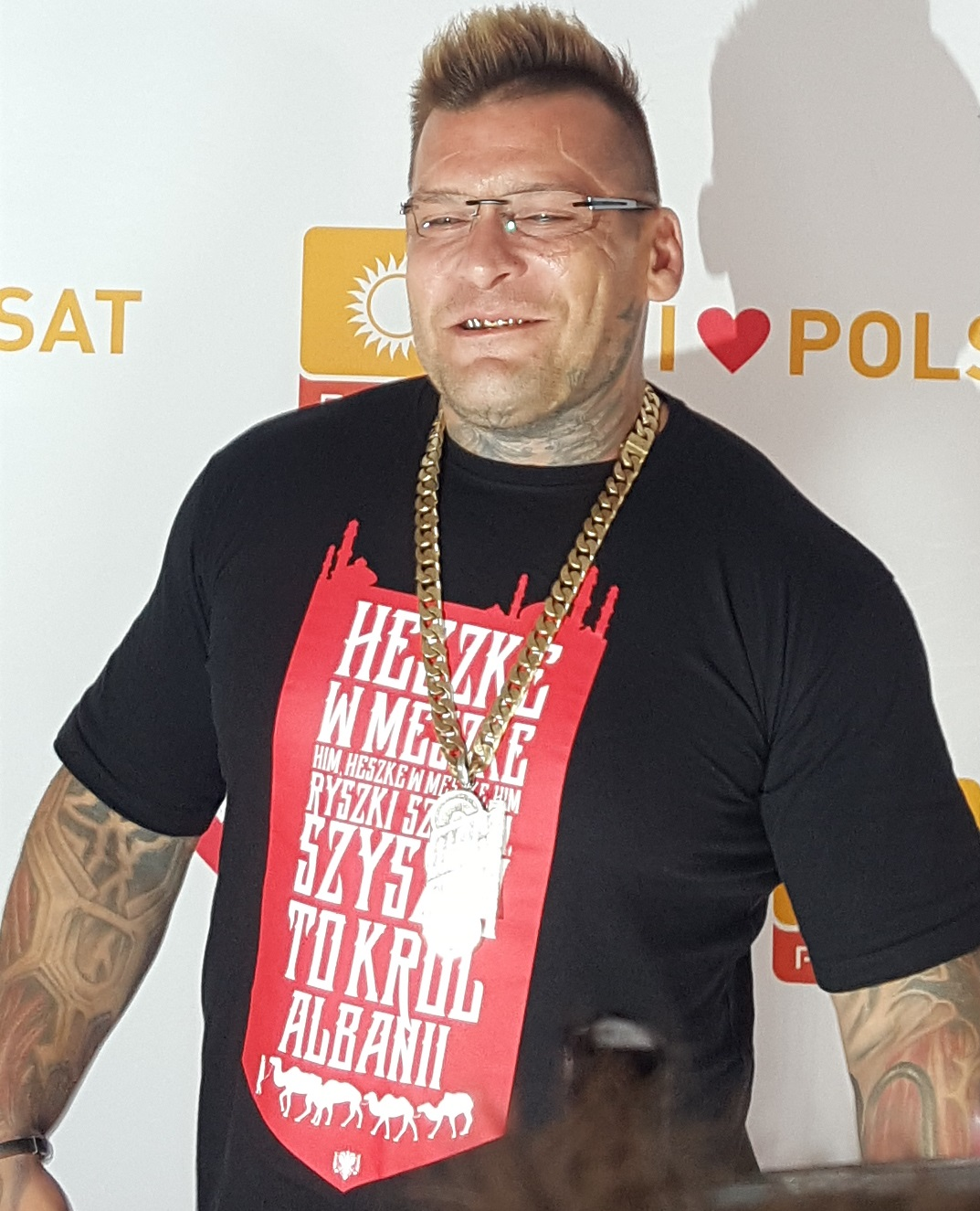 Polski zawodnik mieszanych sztuk walki i raper Paweł "Popek" Mikołajuw na jesiennej konferencji ramówkowej telewizji Polsat w Warszawie, 28 sierrnia 2018.